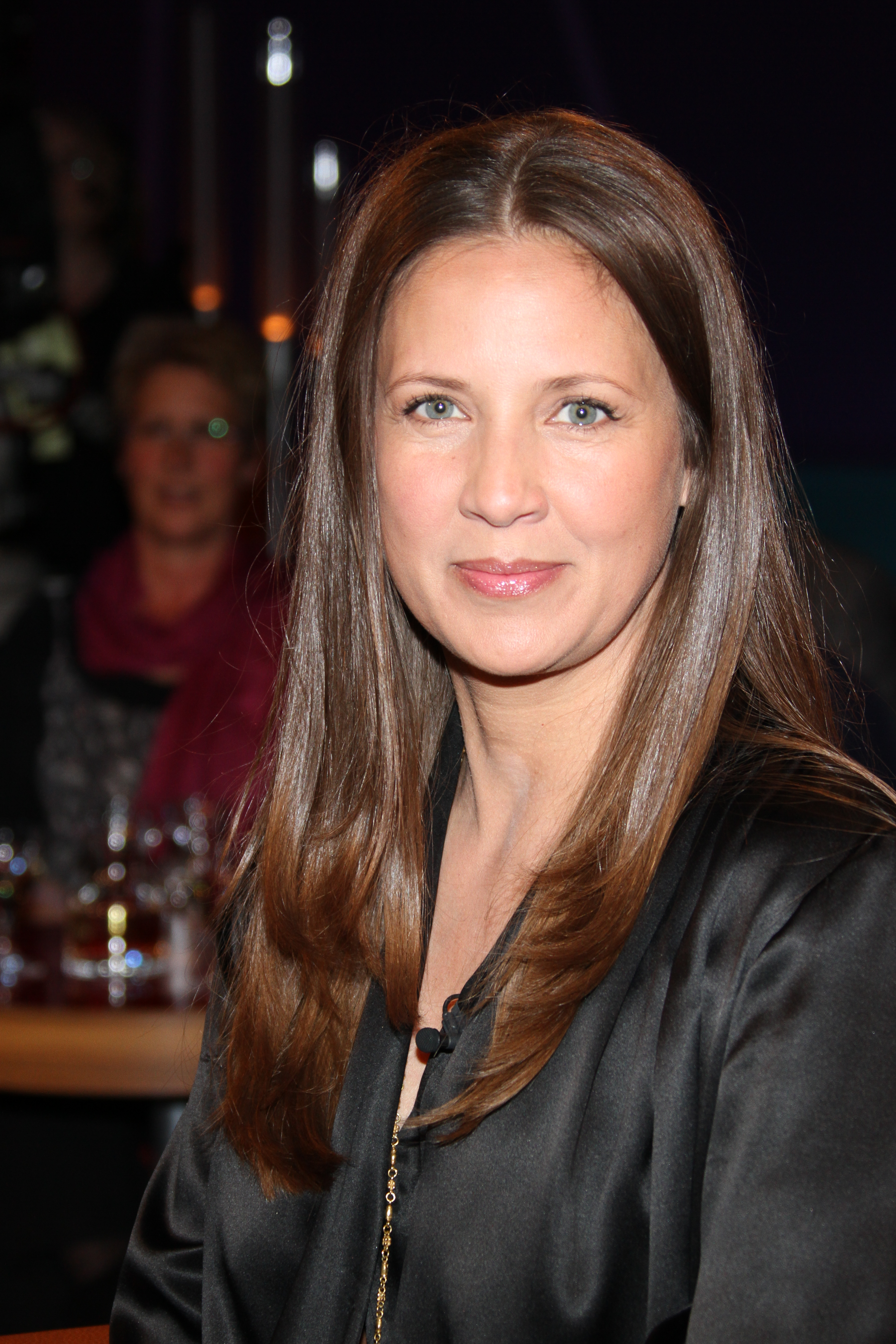 Dana Schweiger (* 29. Februar 1968 in Seattle, Washington als Dana Carlsen) ist eine US-amerikanische Moderatorin, Unternehmerin (Bellybutton) und ehemaliges Model. Sie ist die getrennt lebende Frau von Til Schweiger.